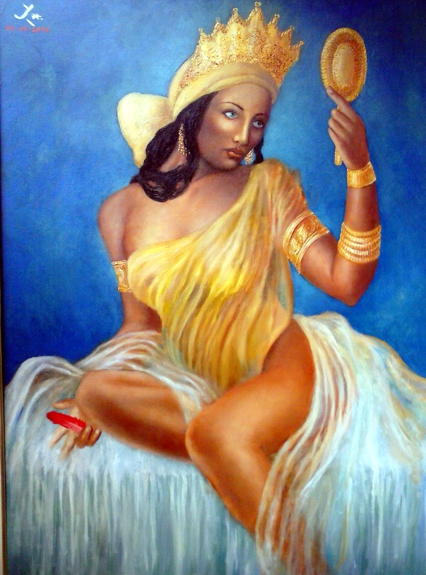 "Ọṣun Olo Ekòdidé Olo Omi Olo Orọ (Oxum Dona do Ekodide, da Água e da Fortuna.) Óleo sobre tela, 60 X 80 cm. 2016. Pintura de minha autoria (Joseph Nunes).